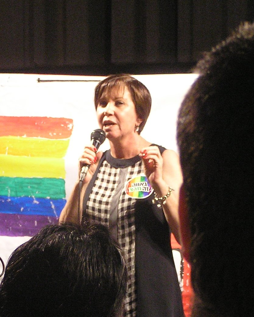 זהבה גלאון נואמת בהפגנה נגד ביטול מצעד הגאווה בבאר שבע